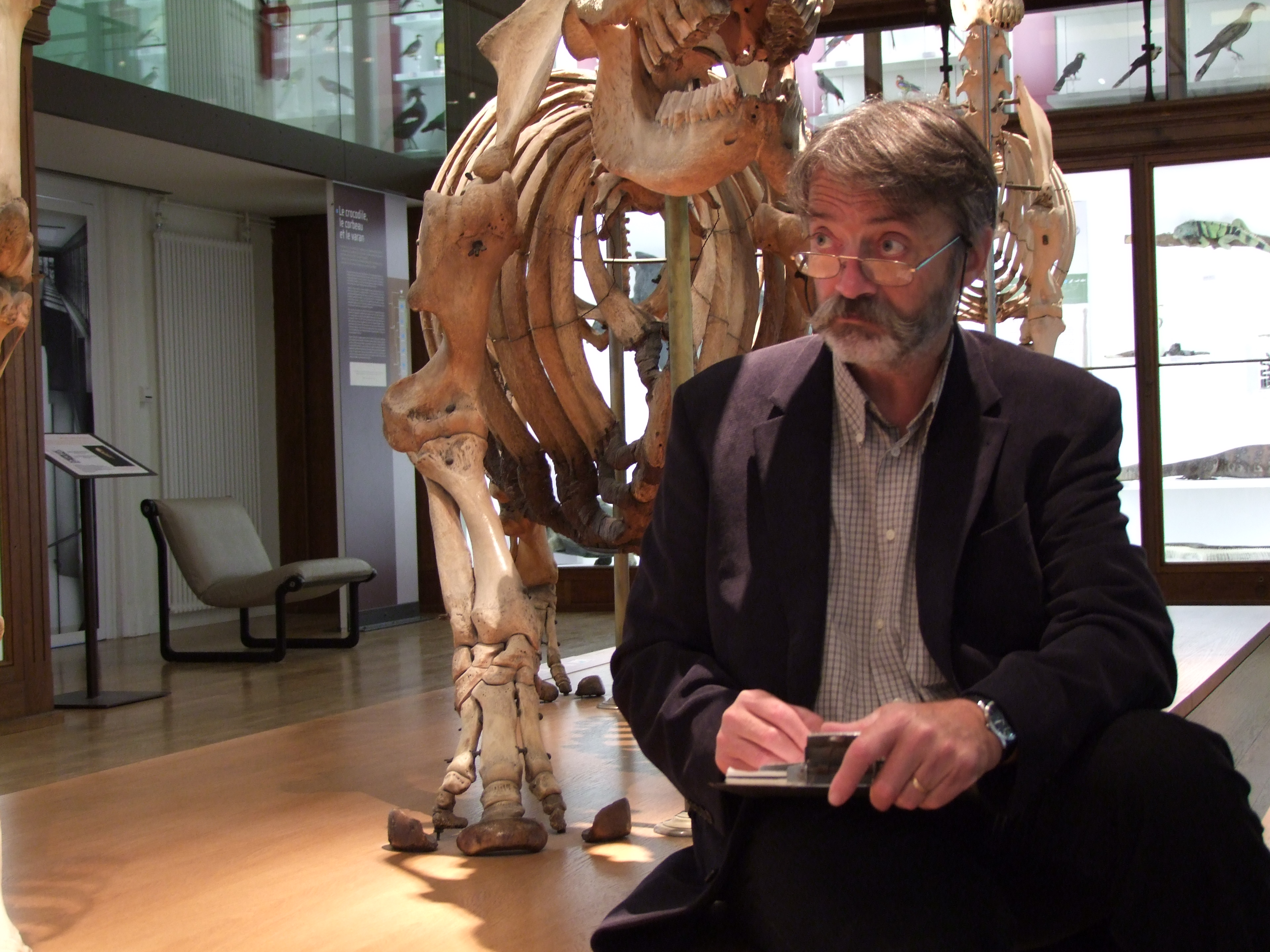 Scéance de croquis par Michel Bassompierre en 2009 au Muséum de Nantes